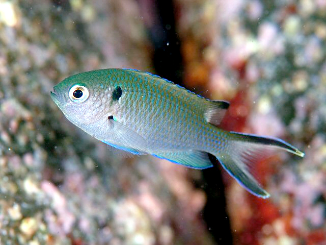 クロリボンスズメダイ Neopomacentrus cyanomos